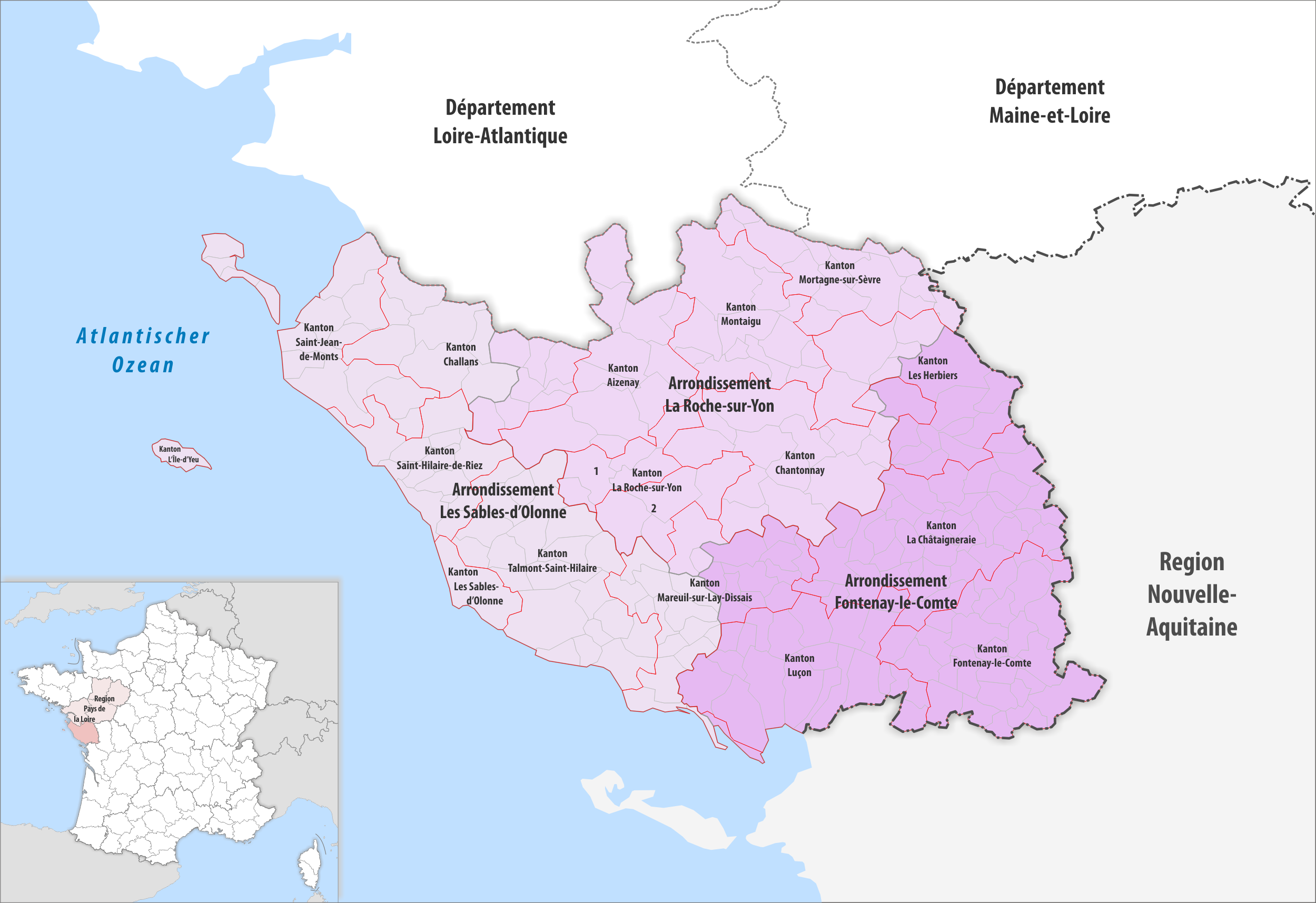 Gemeinden, Kantone und Arrondissemente im Departement Vendée